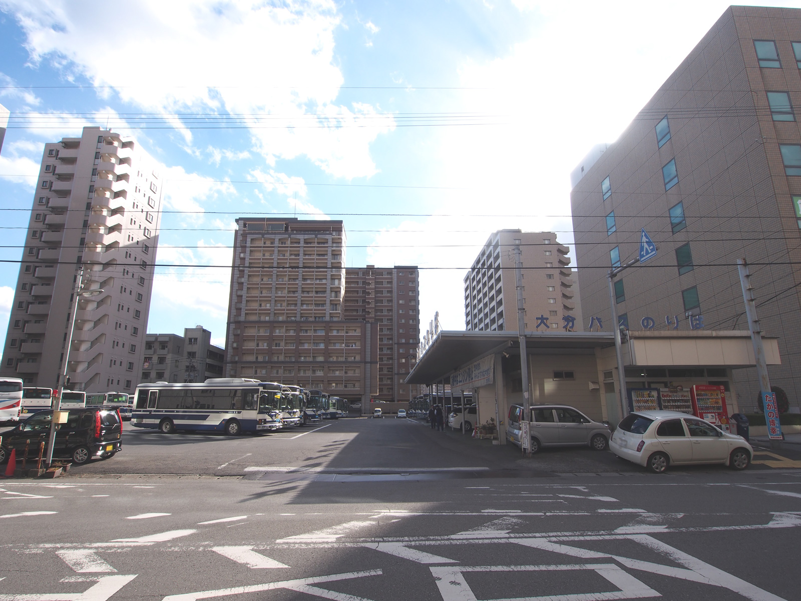 大分バス金池ターミナル（大分県大分市）